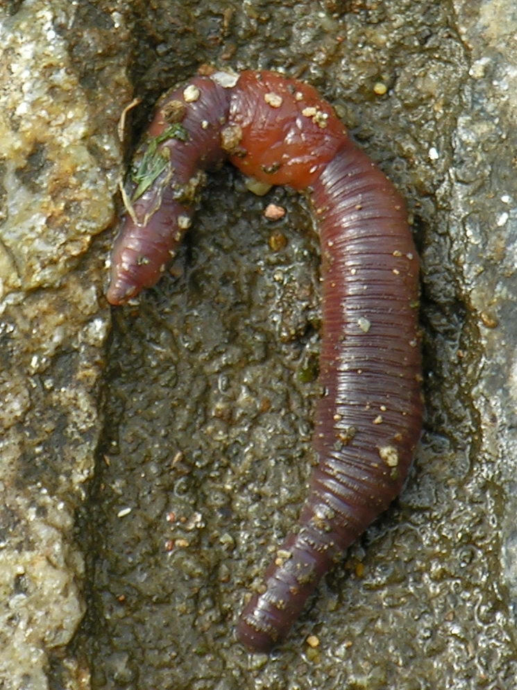 self made. Bastabales - Galicia - Spain